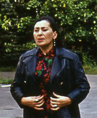 Инна Лиснянская в Переделкино